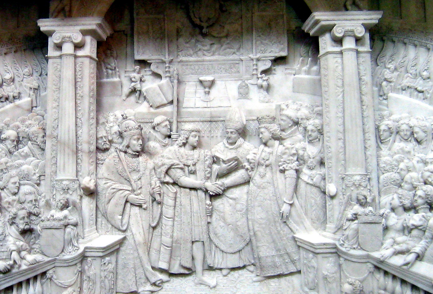 Kenotaph Kaiser Maximilians I. Bildrelief (Ausschnitt) zu Inschrift 12. Heirat von Maximilians Sohn Philipp mit Johanna, einer Tochter der Könige von Spanien